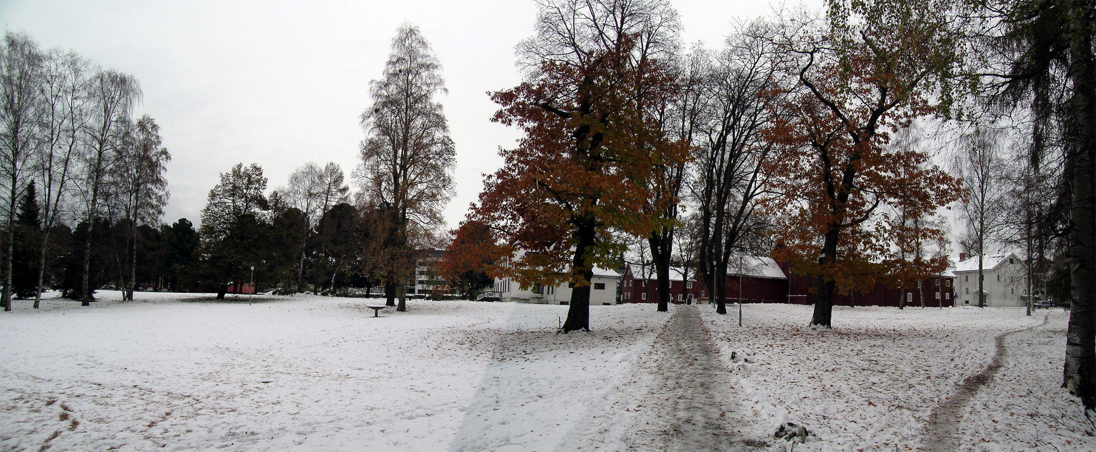 Park at Gjøvik gård, Gjøvik, Norway.